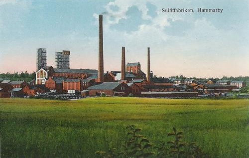 Hammarby, sulfitfabriken. Kolorerat vykort från omkr. år 1900.